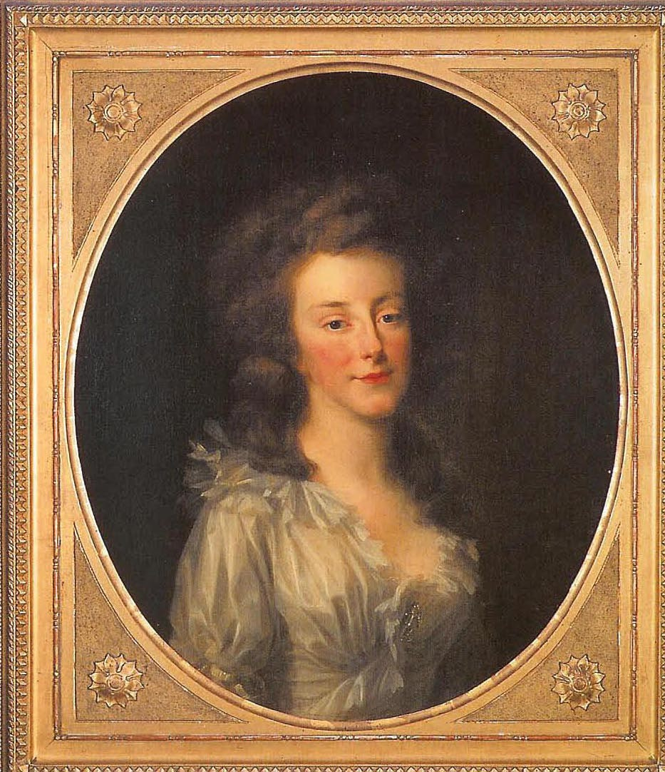 Portret van Frederica Louise Wilhelmina van Oranje-Nassau (overleden 1819).